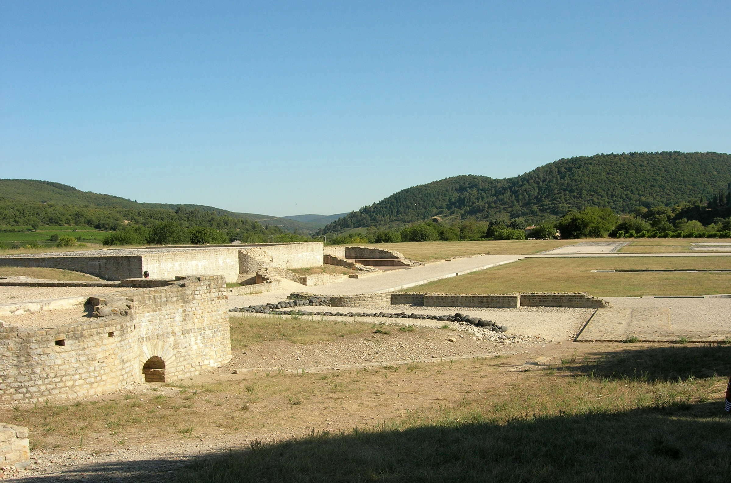 Ruines romaines d'Alba-la-Romaine